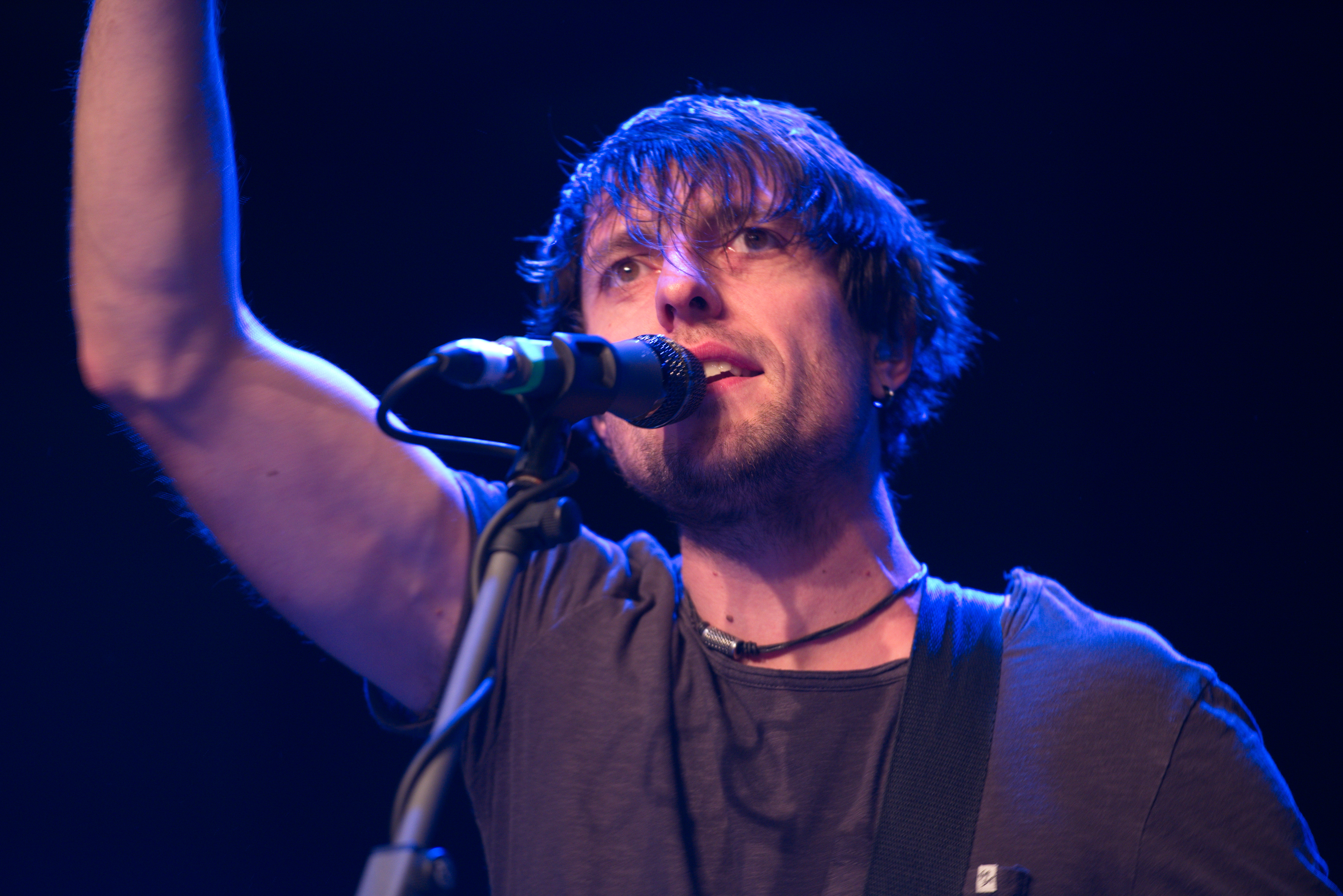 Itchy Poopzkid beim Schüler-Rockfestival 2016